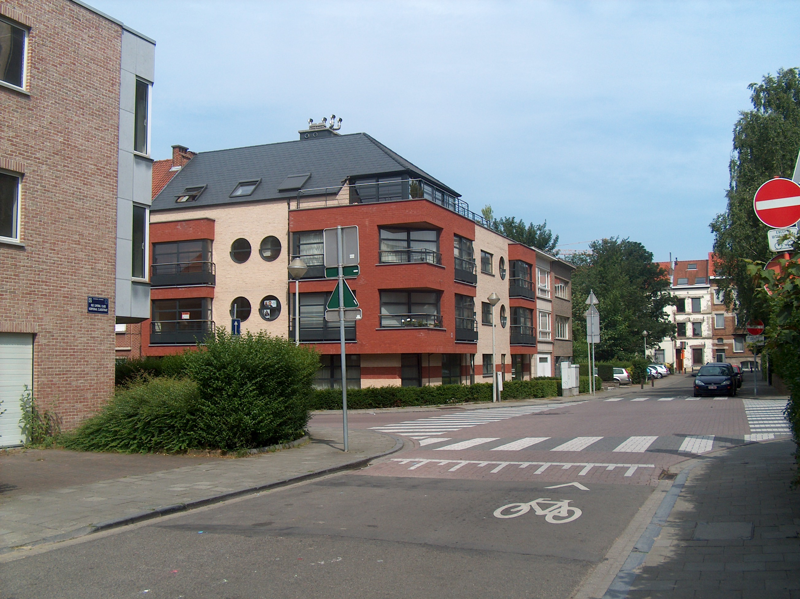 La rue Caporal Claes à Schaerbeek, Bruxelles, Belgique.